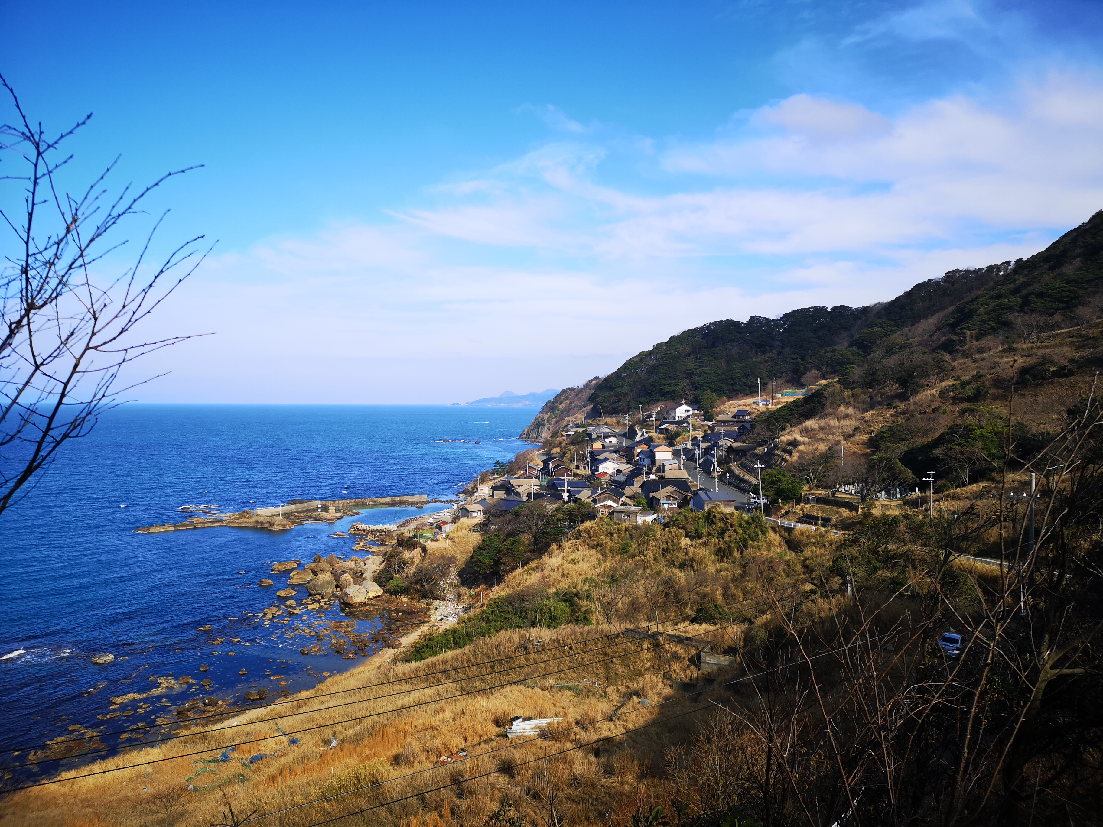 静神社展望台から眺める磯区中心部